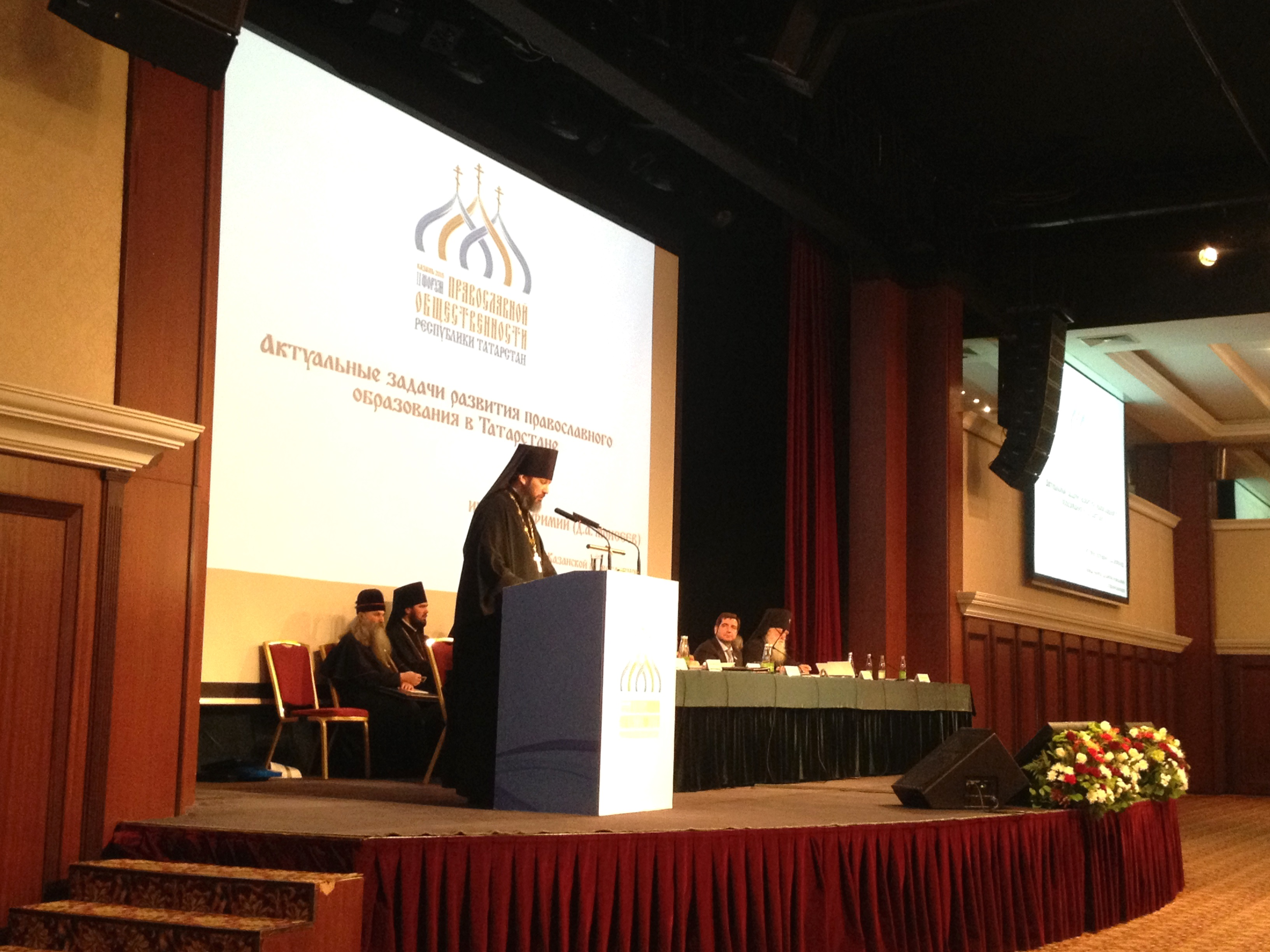 Выступление первого проректора Казанской духовной семинарии, игумена Евфимия (Д. А. Моисеева) на II Форуме православной общественности Республики Татарстан (г. Казань, ГТРК "Корстон", 26 ноября 2015 г.)